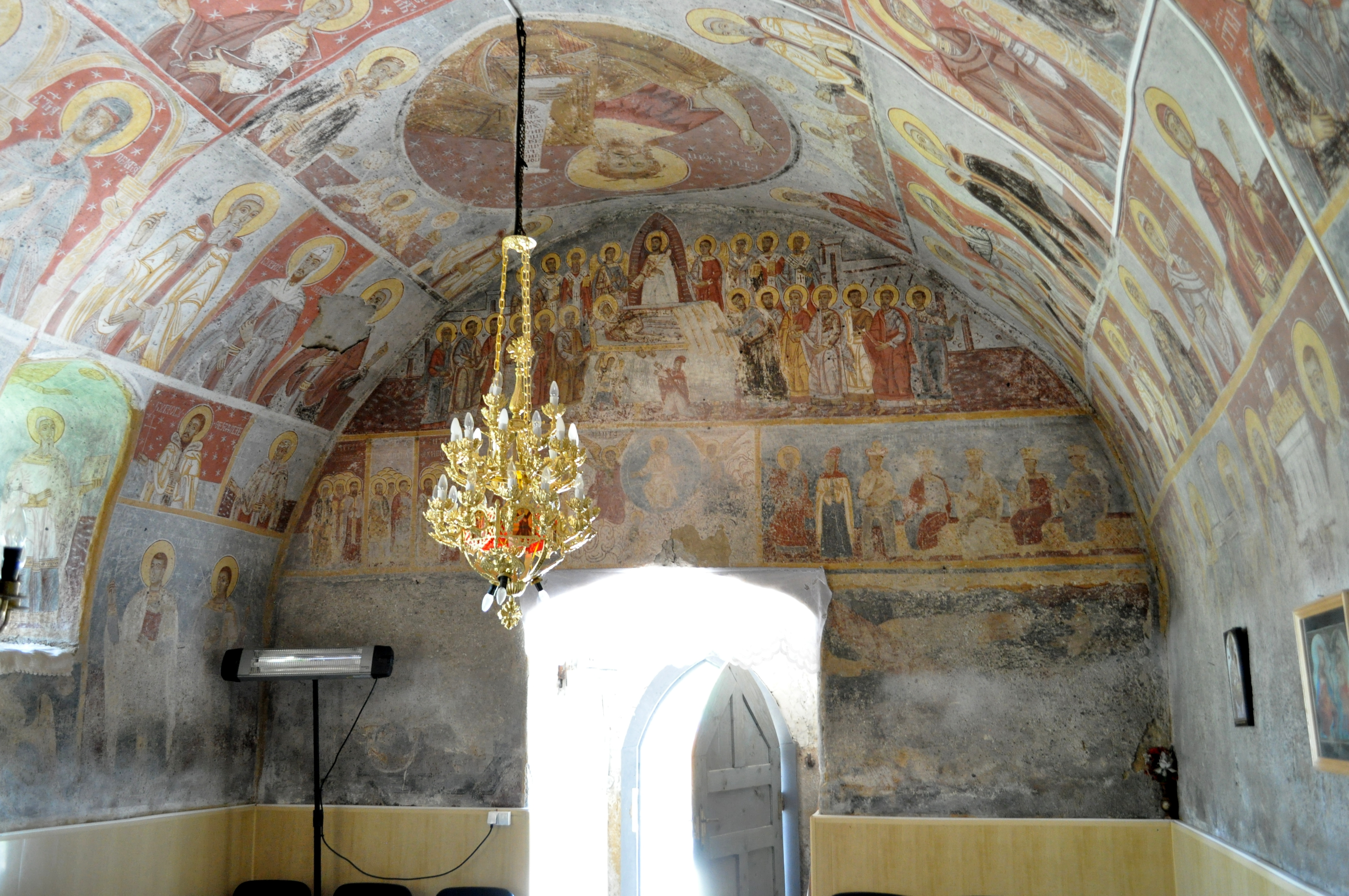 Biserica "Înălţarea Domnului" , sat NUCŞOARA; comuna SĂLAŞU DE SUS